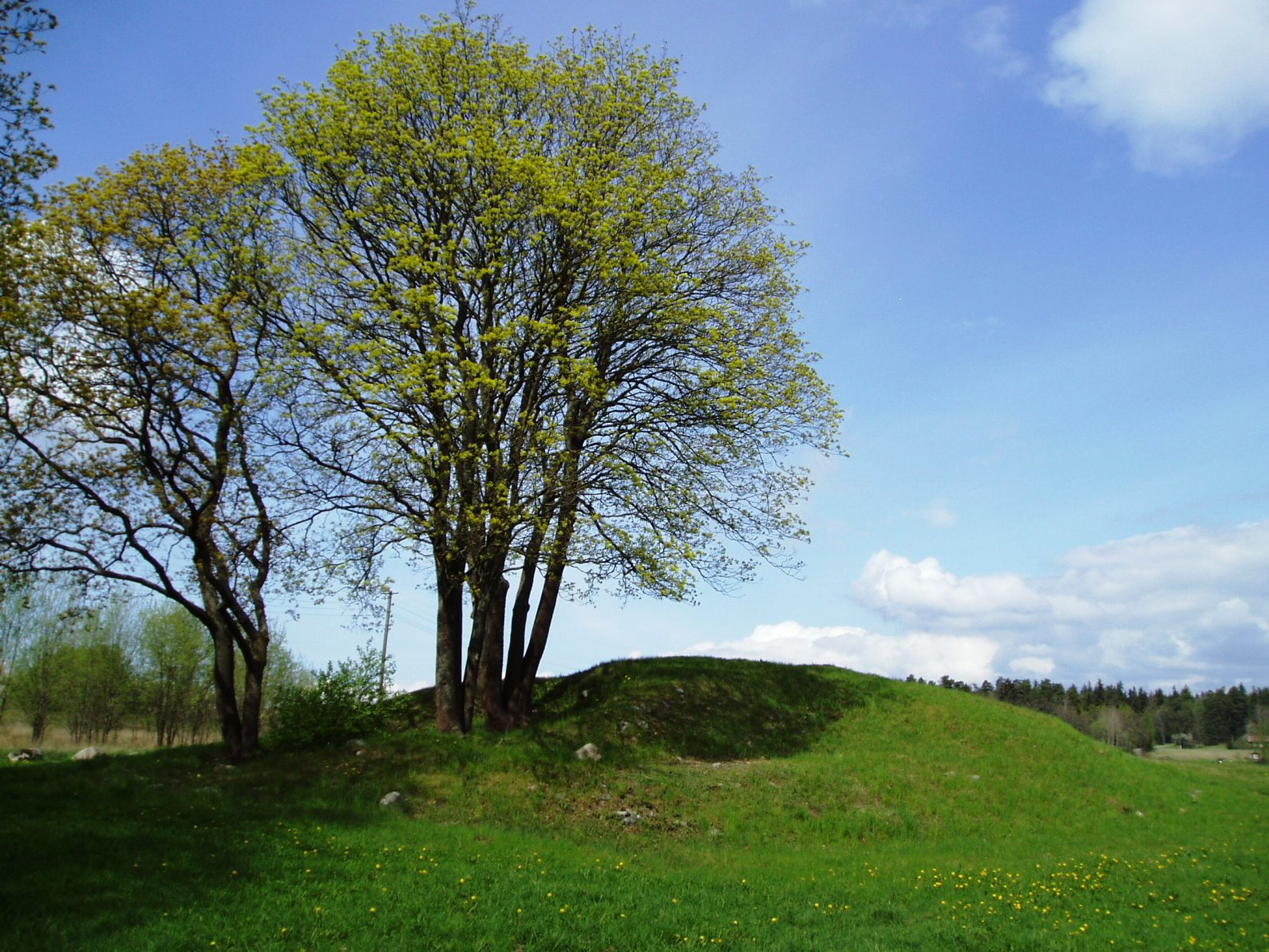 Storhög i Lövsta, Tumulus in Lövsta, Stockholm, Sweden.